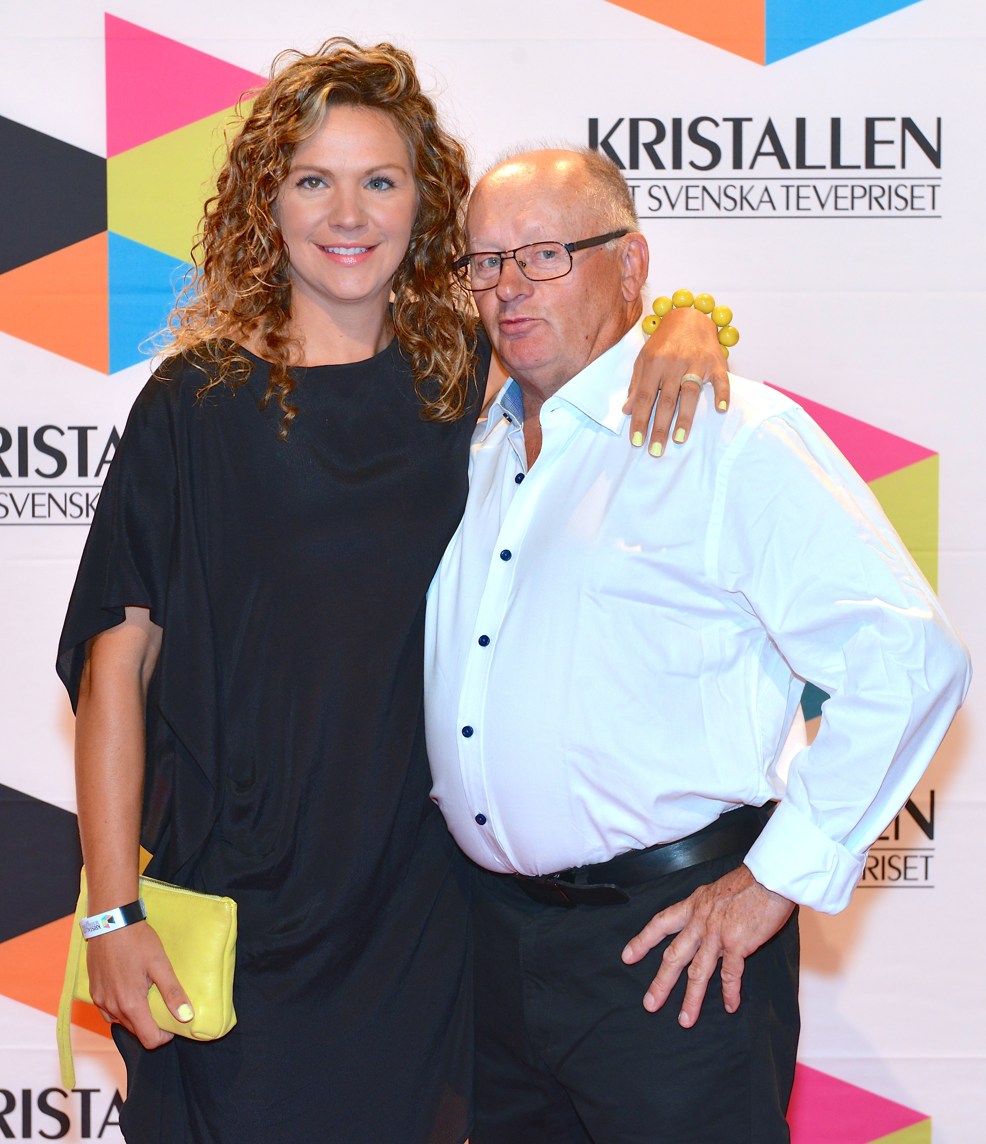 Madeleine Müller och Willy Björkman på Kristallen-galan den 30 augusti 2013.